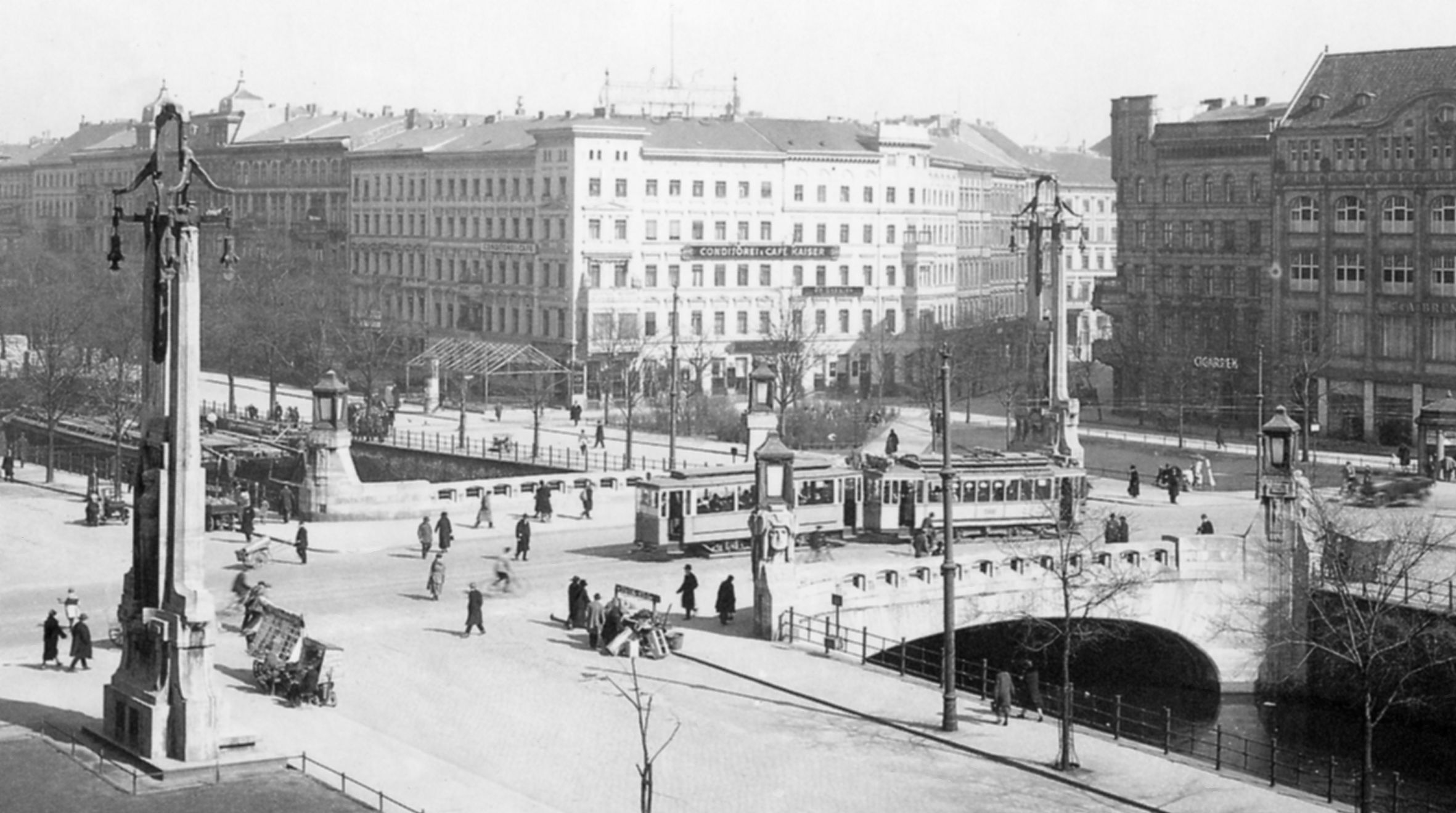 Oranienbrücke über den Luisenstädtischen Kanal in Berlin